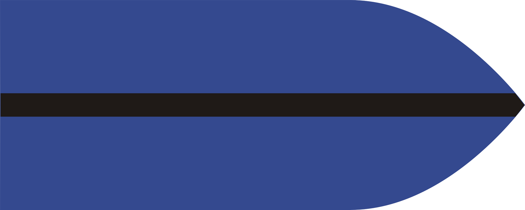 Barwy kompanii samochodowej 2 Dywizji Strzelców Pieszych Polskich Sił Zbrojnych na Zachodzie